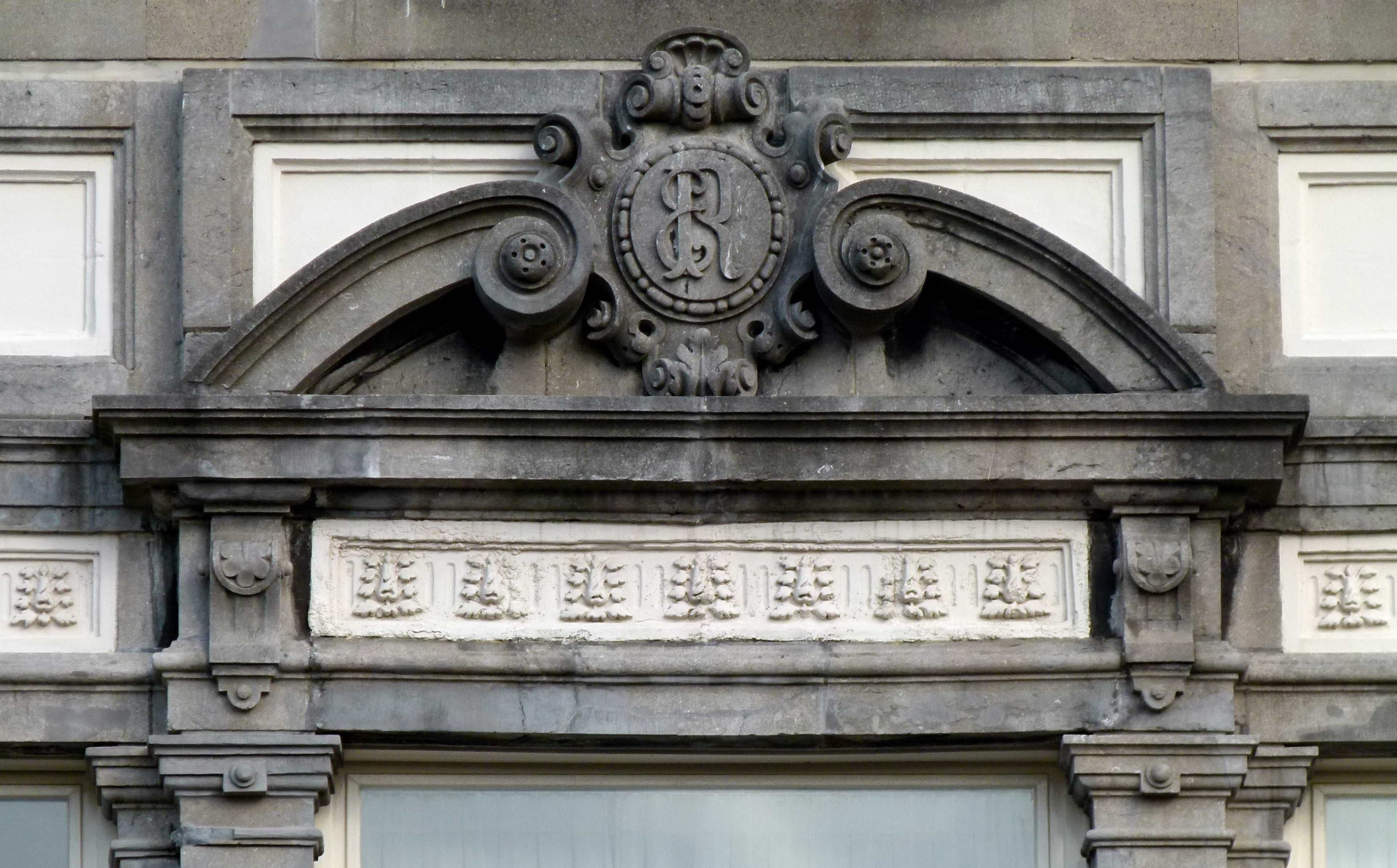 Geveldetail van Villa Wyckerveld in Maastricht. De villa werd in 1879 naar een ontwerp van de Belgische architect Julien Rémont gebouwd voor de Maastrichtse industrieel Eugène Regout en zijn gezin. Na tientallen jaren dienst te hebben gedaan als RK Huishouschool Wijckerveld, werd de villa omstreeks 1994 verbouwd tot appartementencomplex.